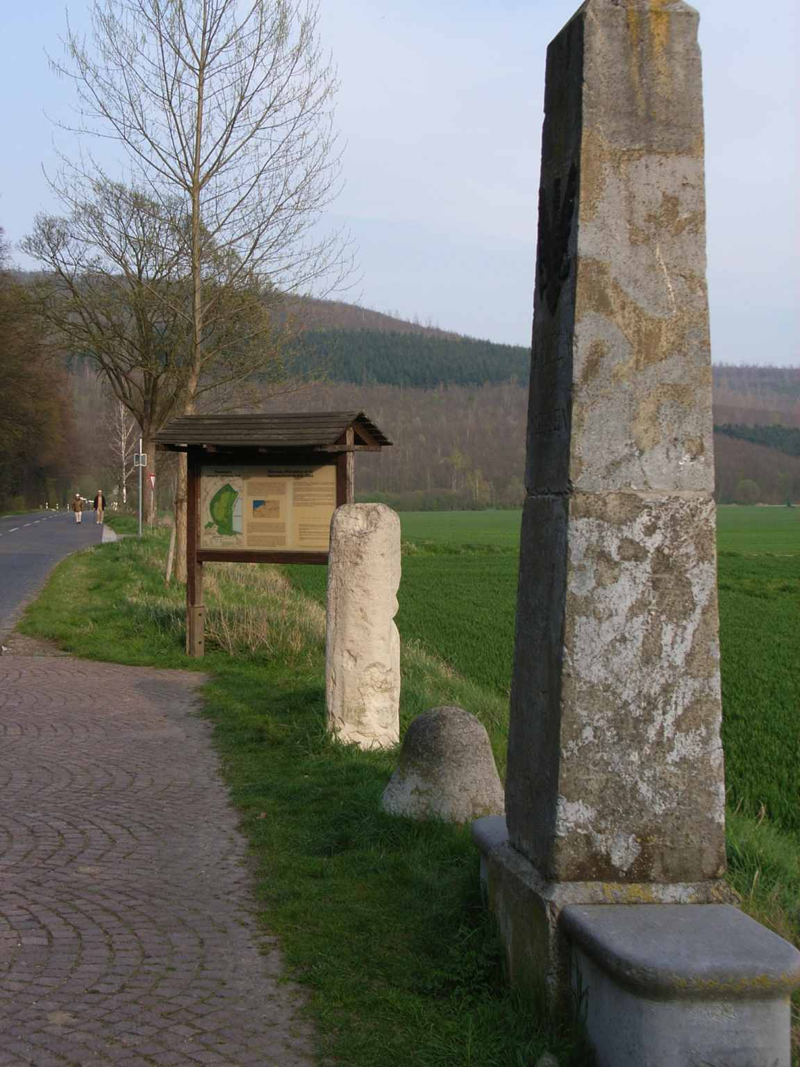 preußische Meilensteine aufgestellt an der Sophienhöhe